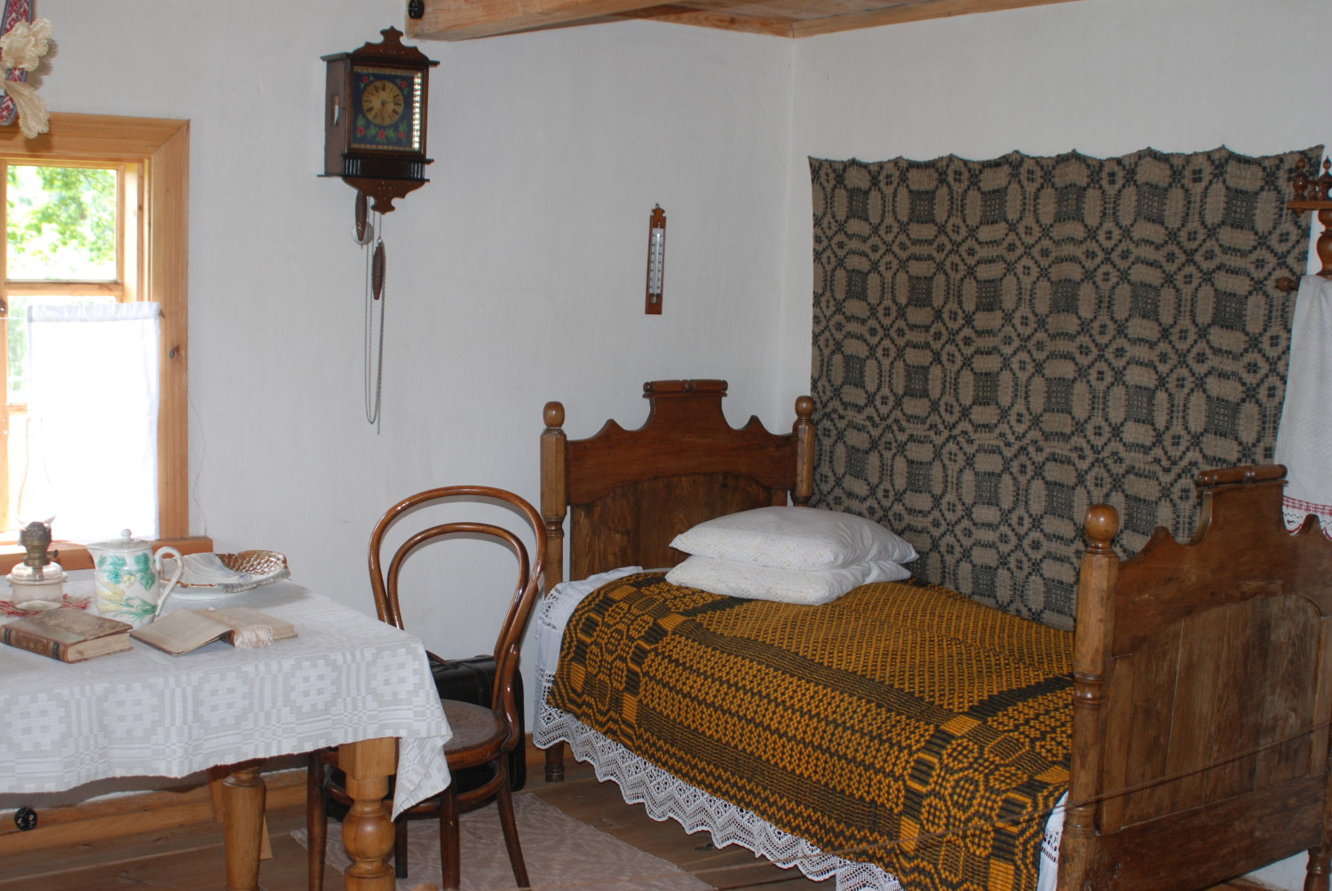 Узноўлены пакой Максіма Багдановіча ў доме арандатара (фальварак Ракуцёўшчына). Фота з сайта Дзяржаўнага музея гісторыі беларускай літаратуры.